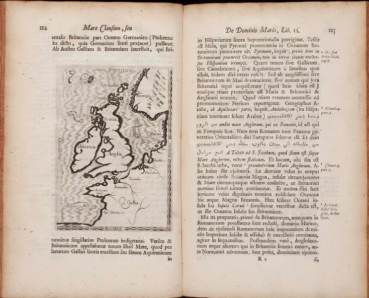 Mare clausum 1635b